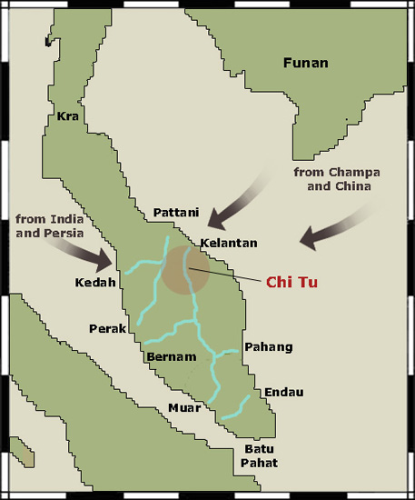 Chi Tu kingdom